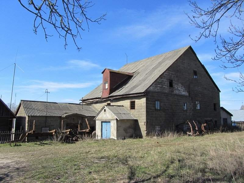 Турэц (Карэліцкі раён). Млын